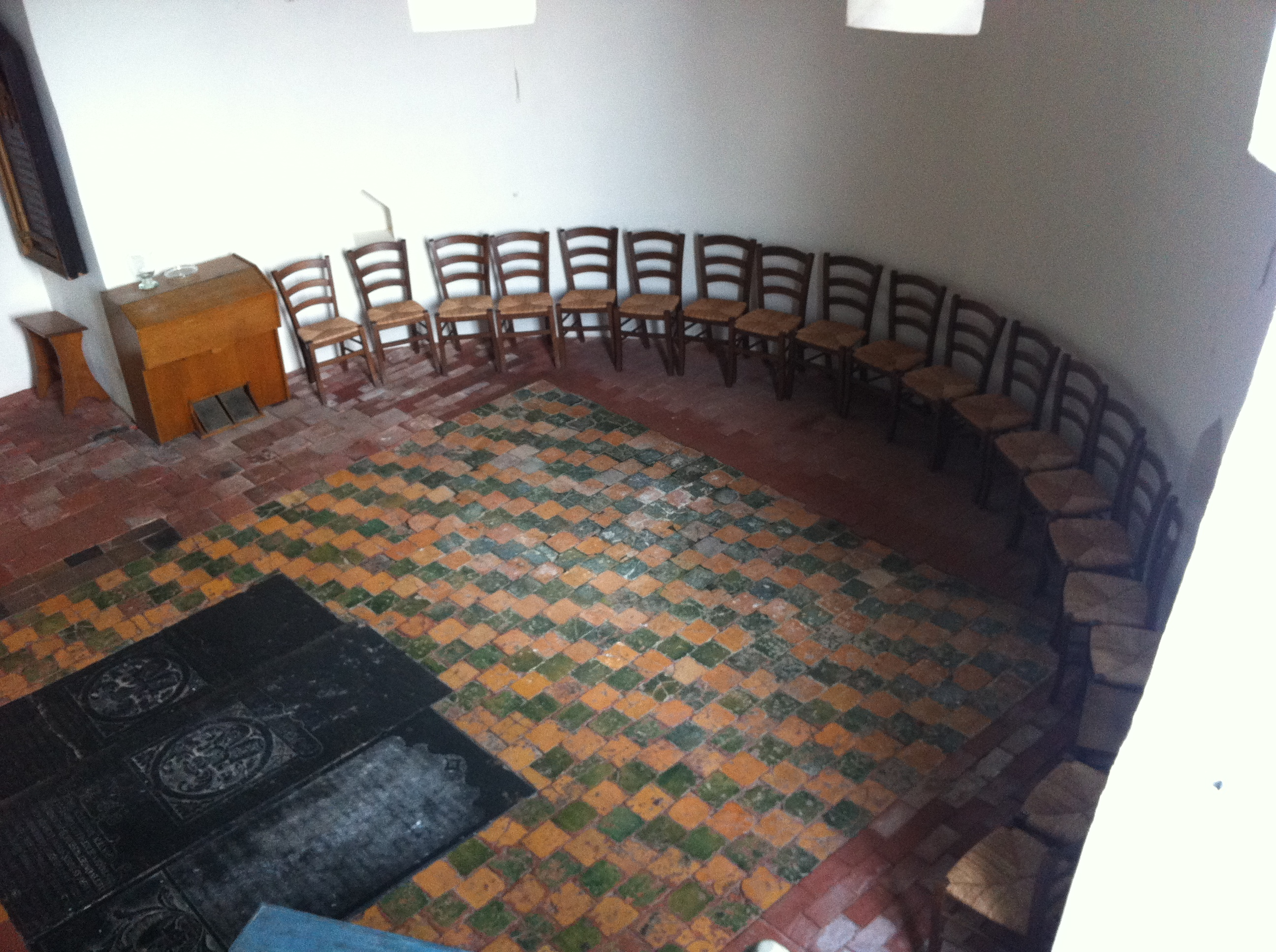 Apsis der Kirche in Midlum, Rheiderland, Landkreis Leer, Niedersachsen, Deutschland